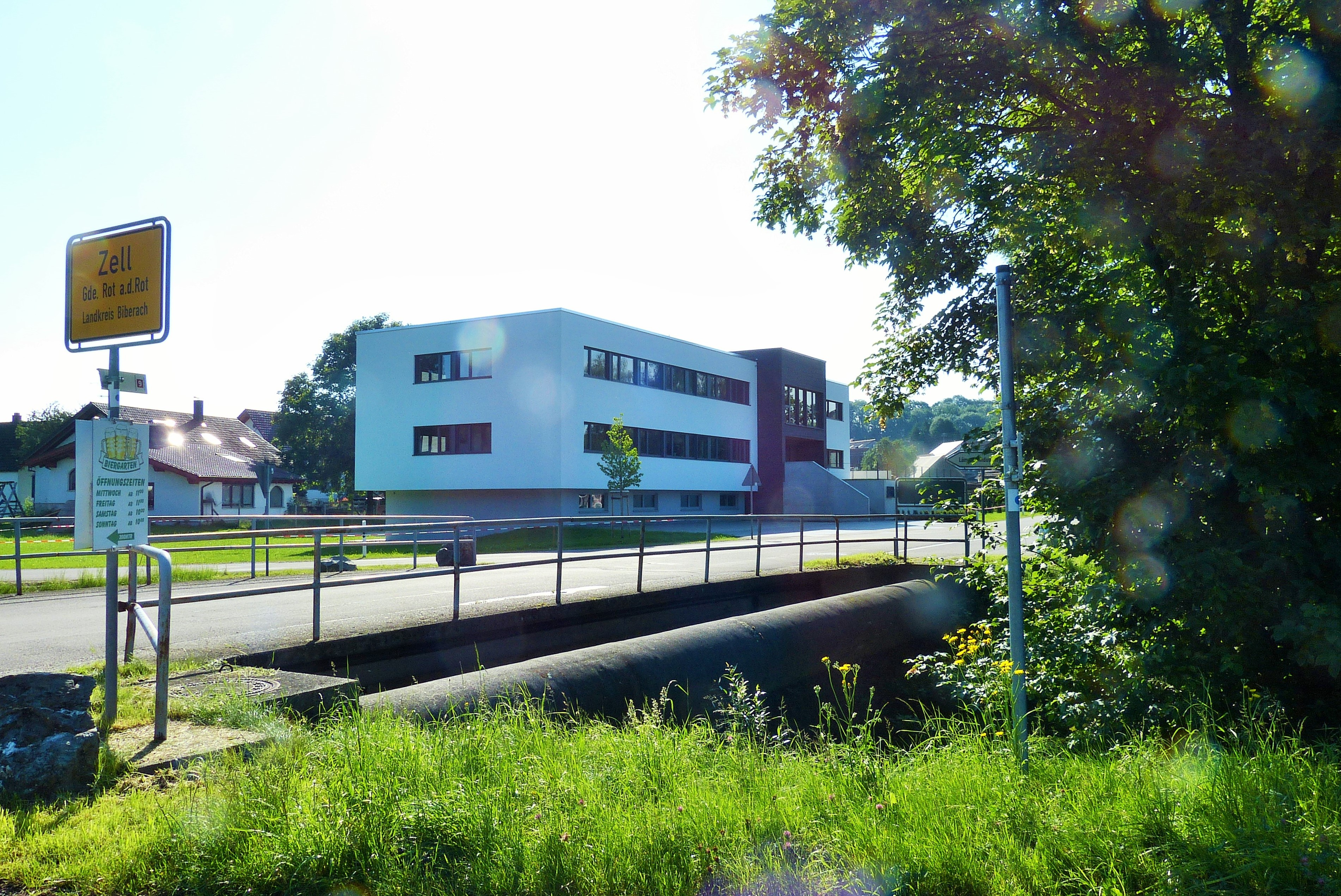 Lämmle Industriepack Verpackungsgesellschaft Zell mbH & Co. KG; 2020